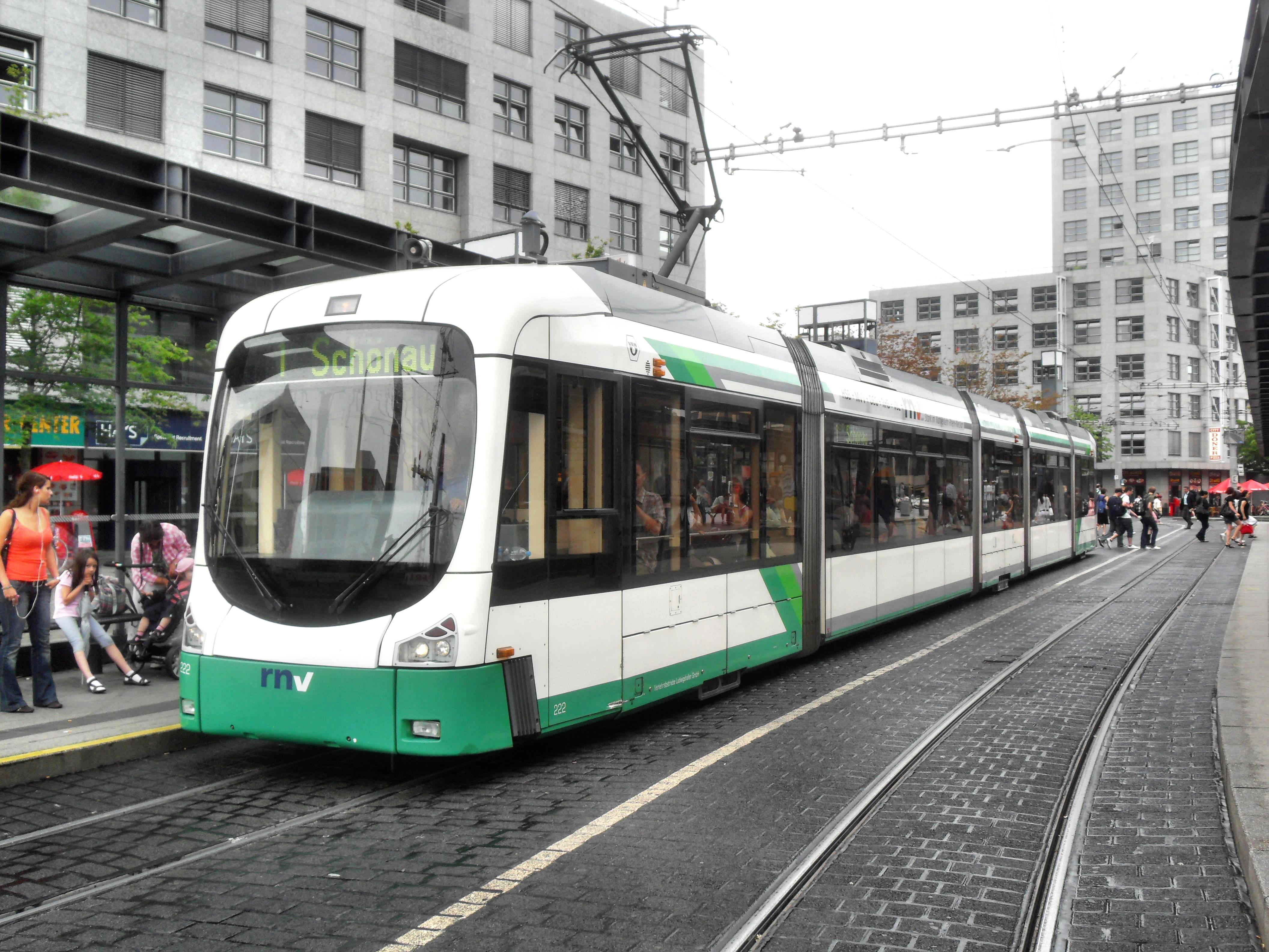 Die Straßenbahnhaltestelle des Mannheimer Hauptbahnhofes in Baden-Württemberg (Deutschland)